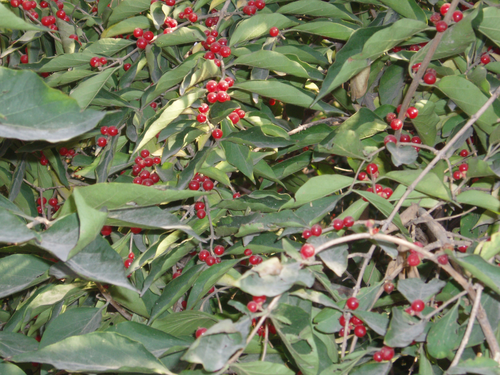 Amur maackii in autumn